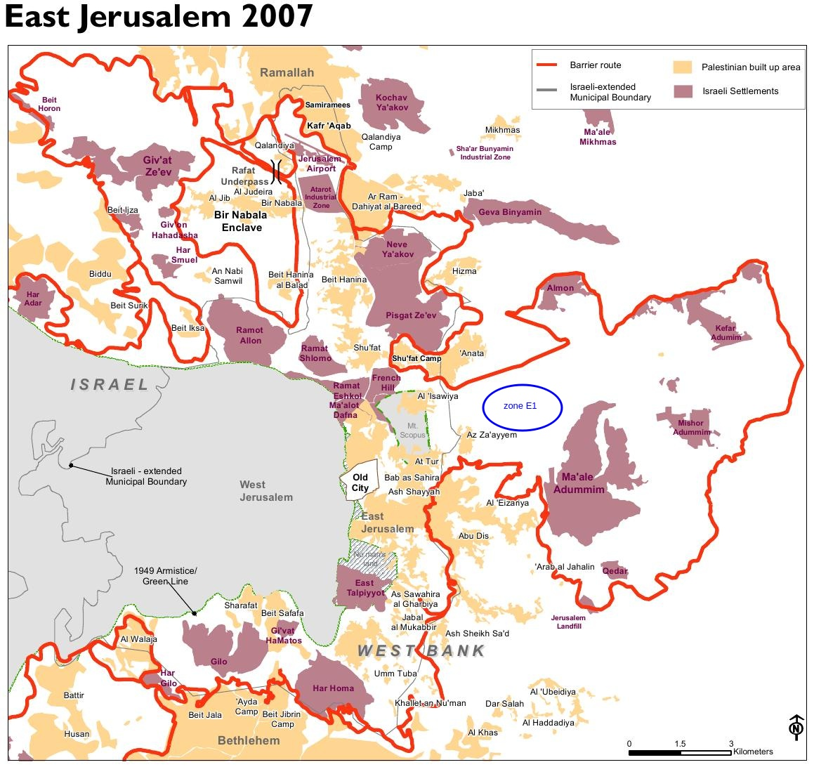 empalcement approximatif de la zone E1, carte du domaine public disponible ici